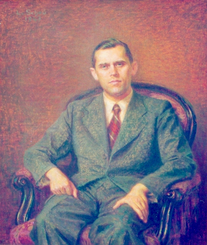 Porträt in Öl